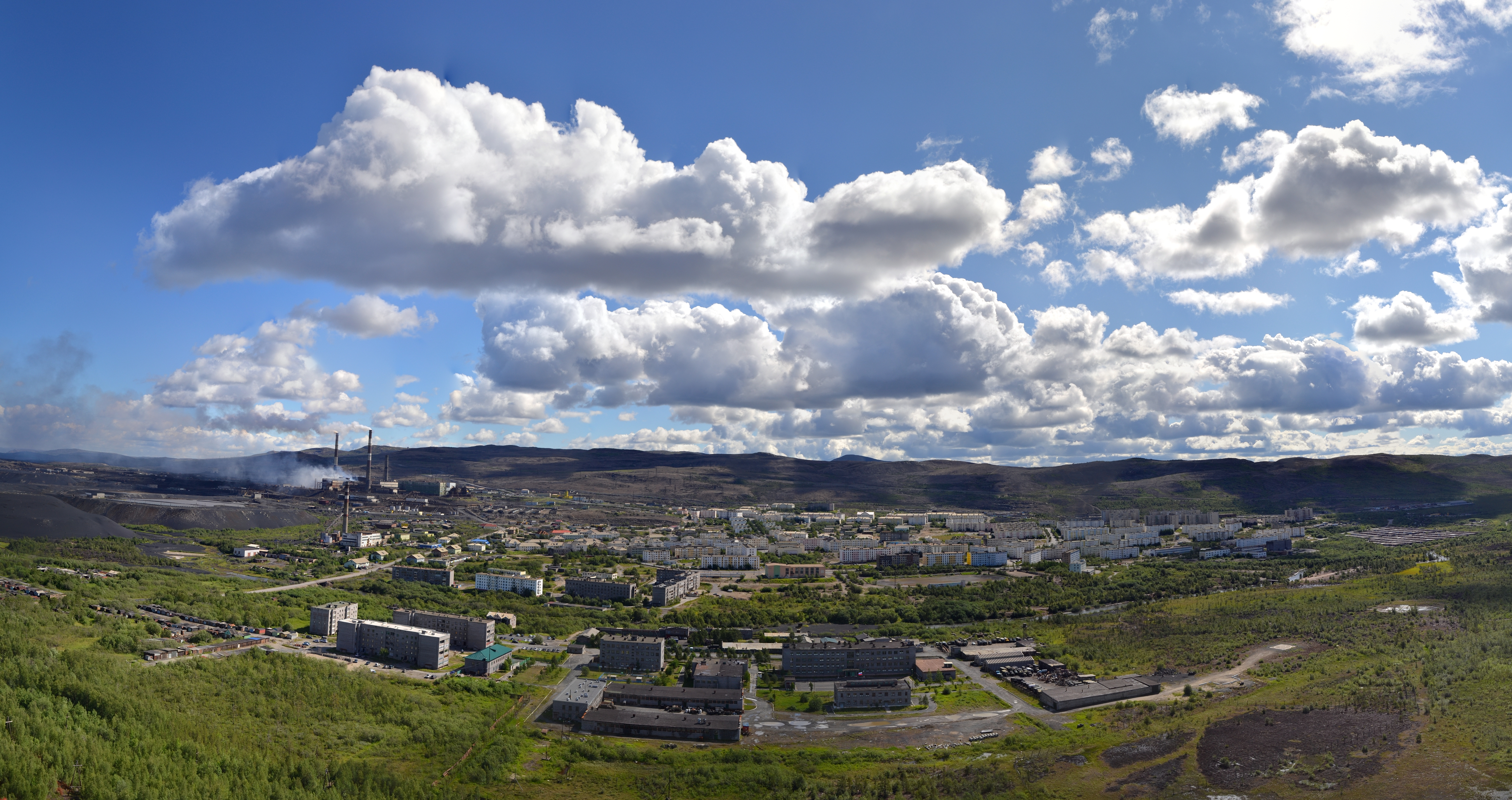 Панорама Никеля